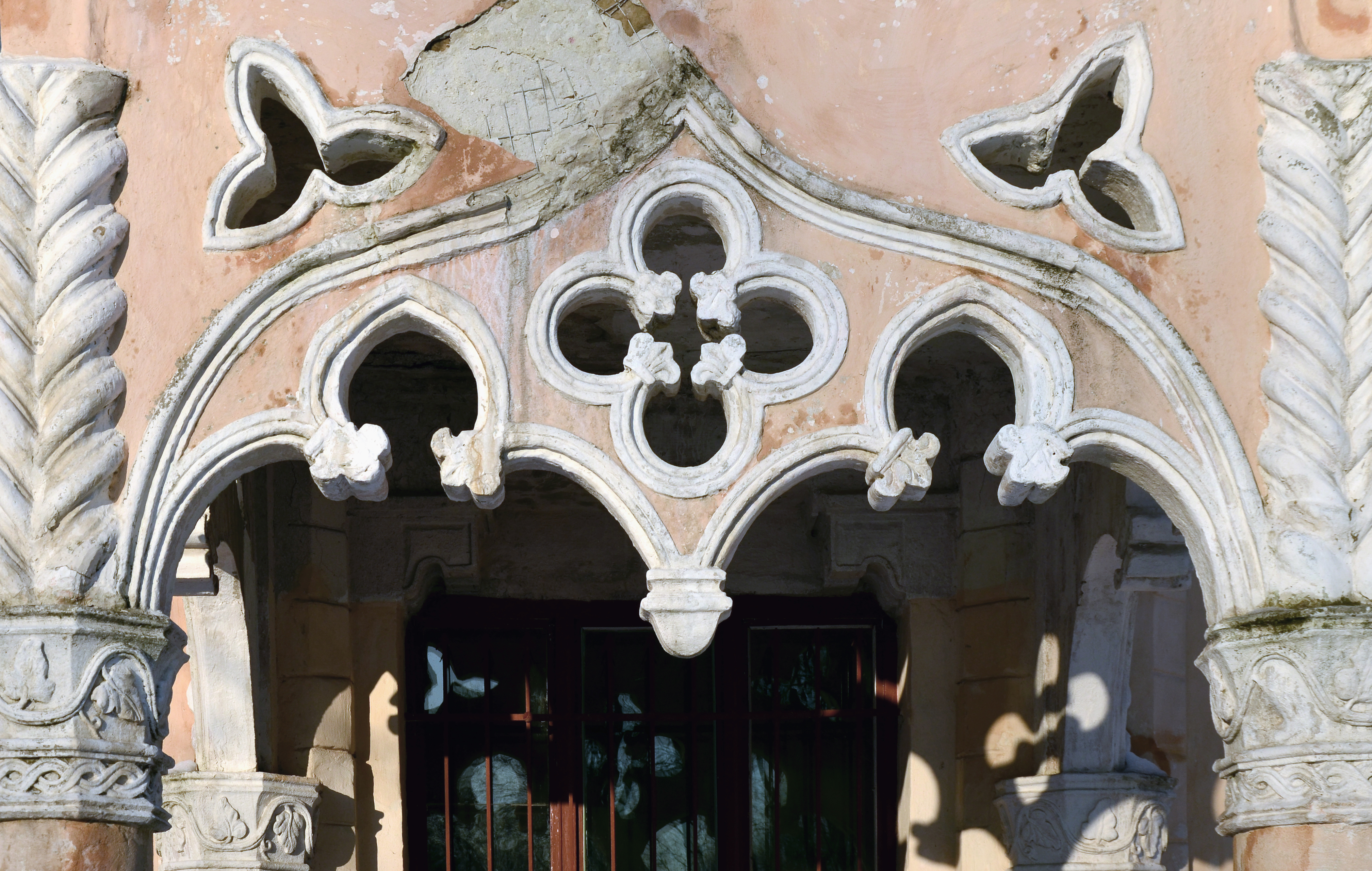 Будинок № 50а на вулиці Пекарській у Львові.